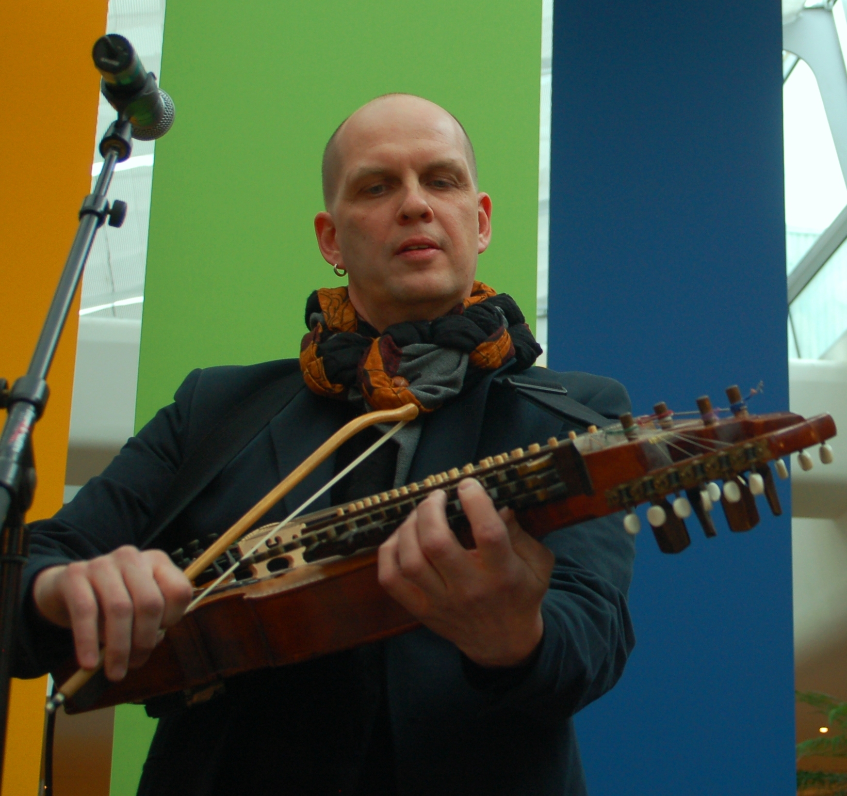 Mats Wester, Nordman